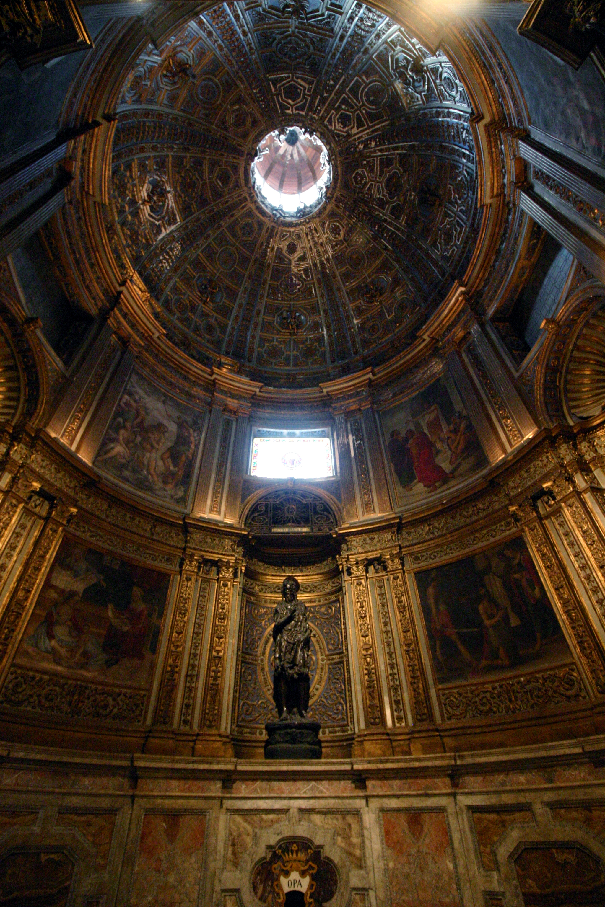 Duomo - Siena